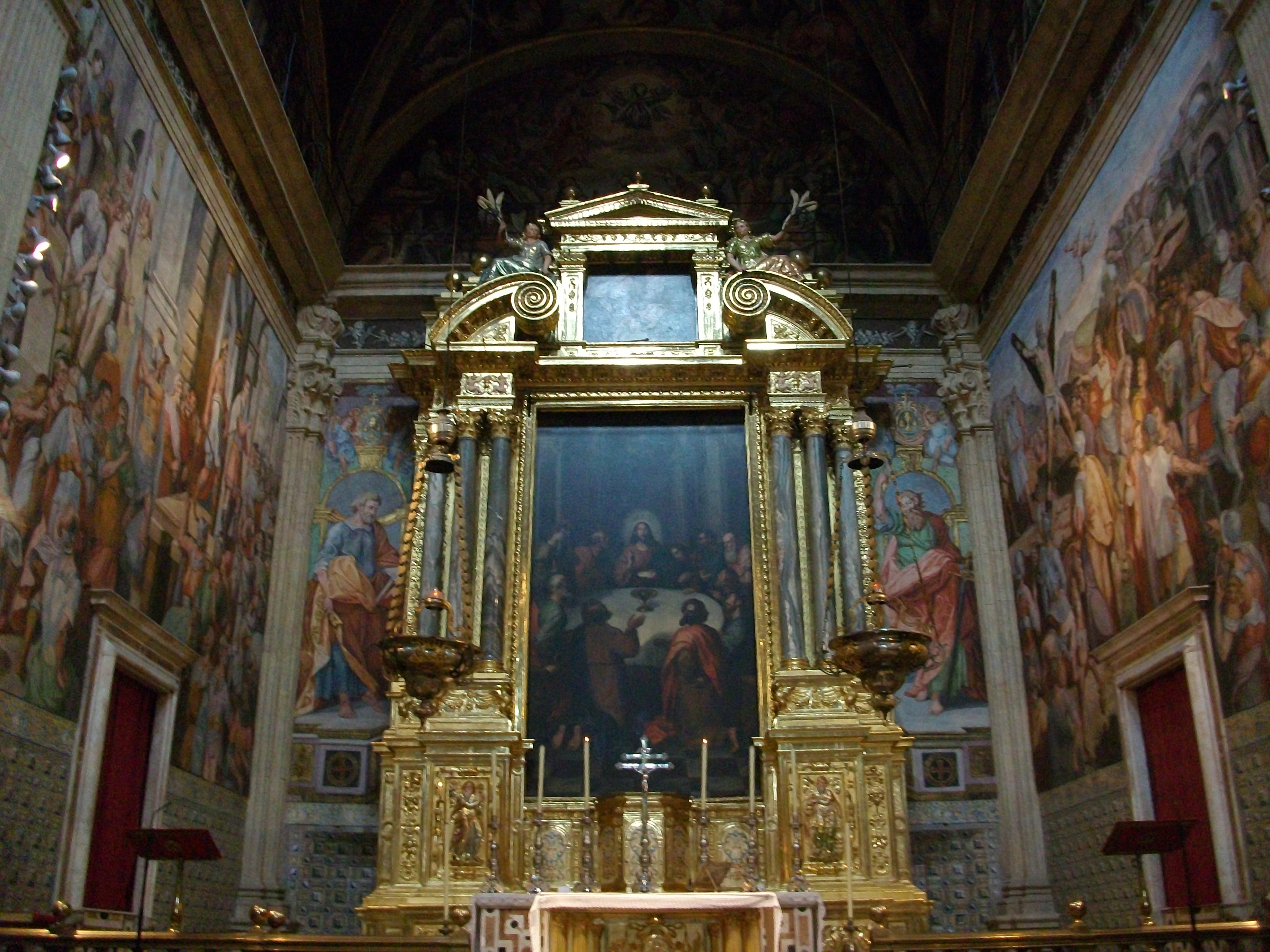 Altar major de l'església del Col·legia del Corpus Christi o del Patriarca.